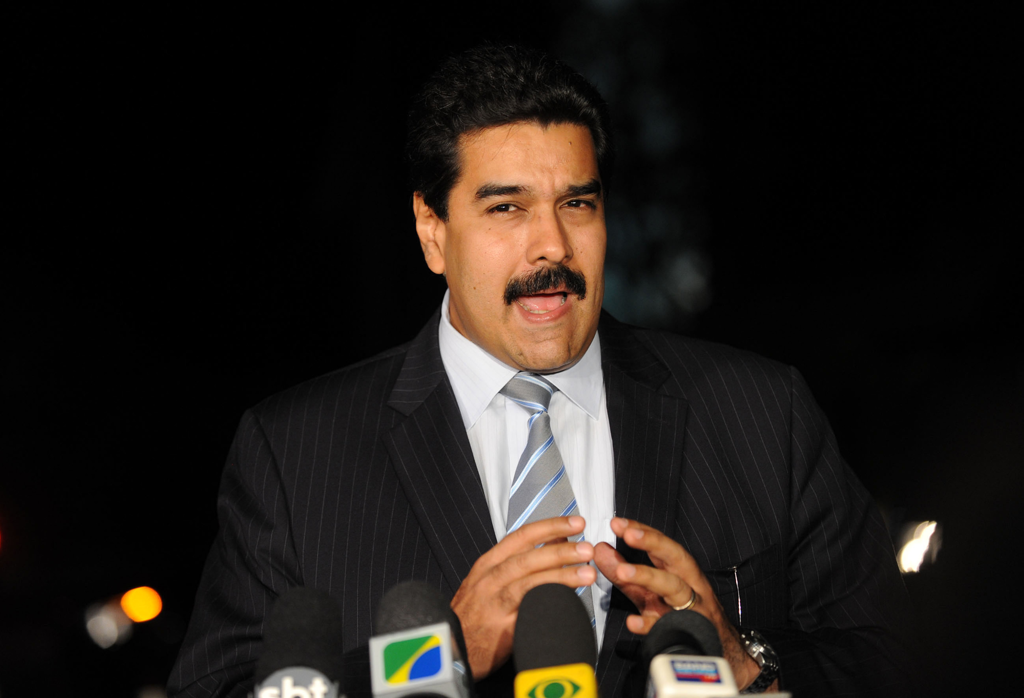 Brasília - O chanceler da Venezuela, Nicolás Maduro, fala à imprensa após se reúnir com o presidente Lula (Fabio Rodrigues Pozzebom/ABr).